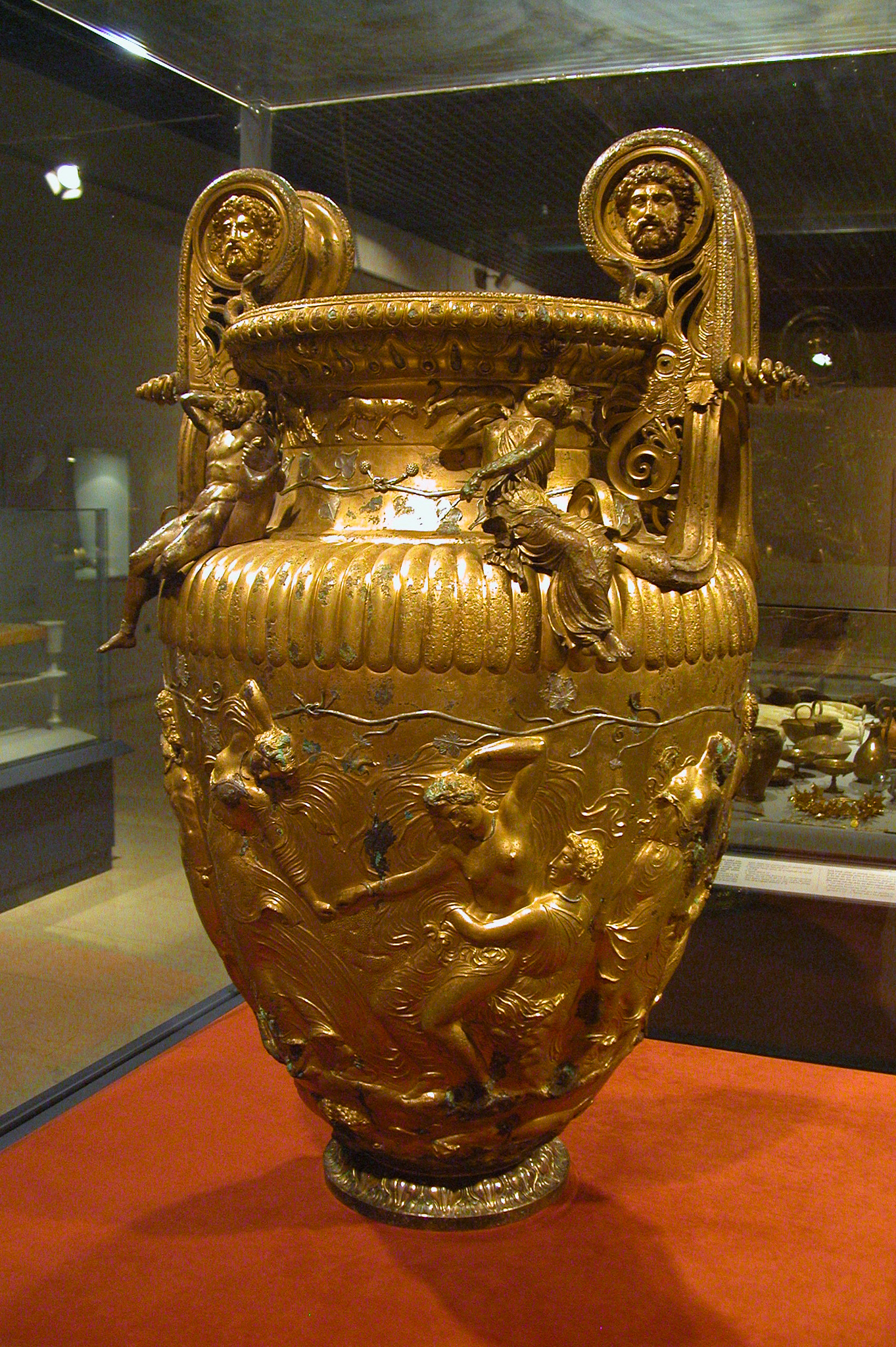 Photographie du Cratère de Derveni, utilisé comme urne funéraire dans le tombeau de Deverni, et ayant auparavant servi pour mélanger du vin et de l'eau. La richesse de sa décoration est un hymne aux divinités Ariane et Dyonisos. La dorure est obtenue à l'aide d'un alliage spécial, à base de bronze et d'étain, mais sans la moindre trace d'or. Le vase est composé de deux feuilles de métal qui ont été martelées, tandis que les anses et les volutes ont été fondues. Chalcidice, vers 330-320 avant Jésus Christ.